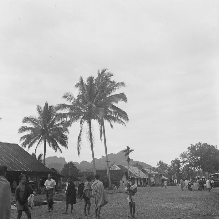 negatief. De hoofdweg met Shell benzinepompstation in Rantepao